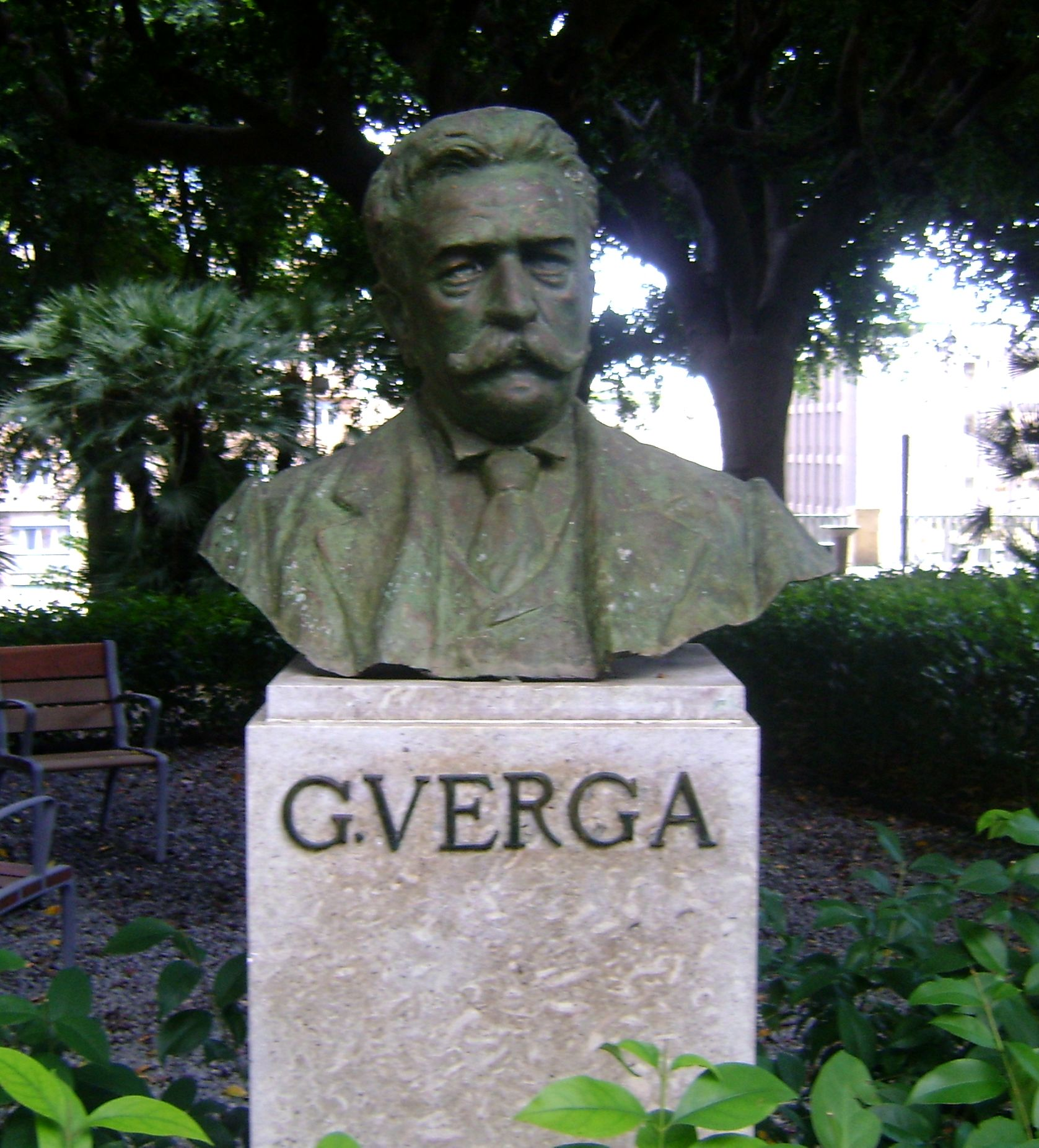 Giovanni Verga - giardino bellini - settembre 2010